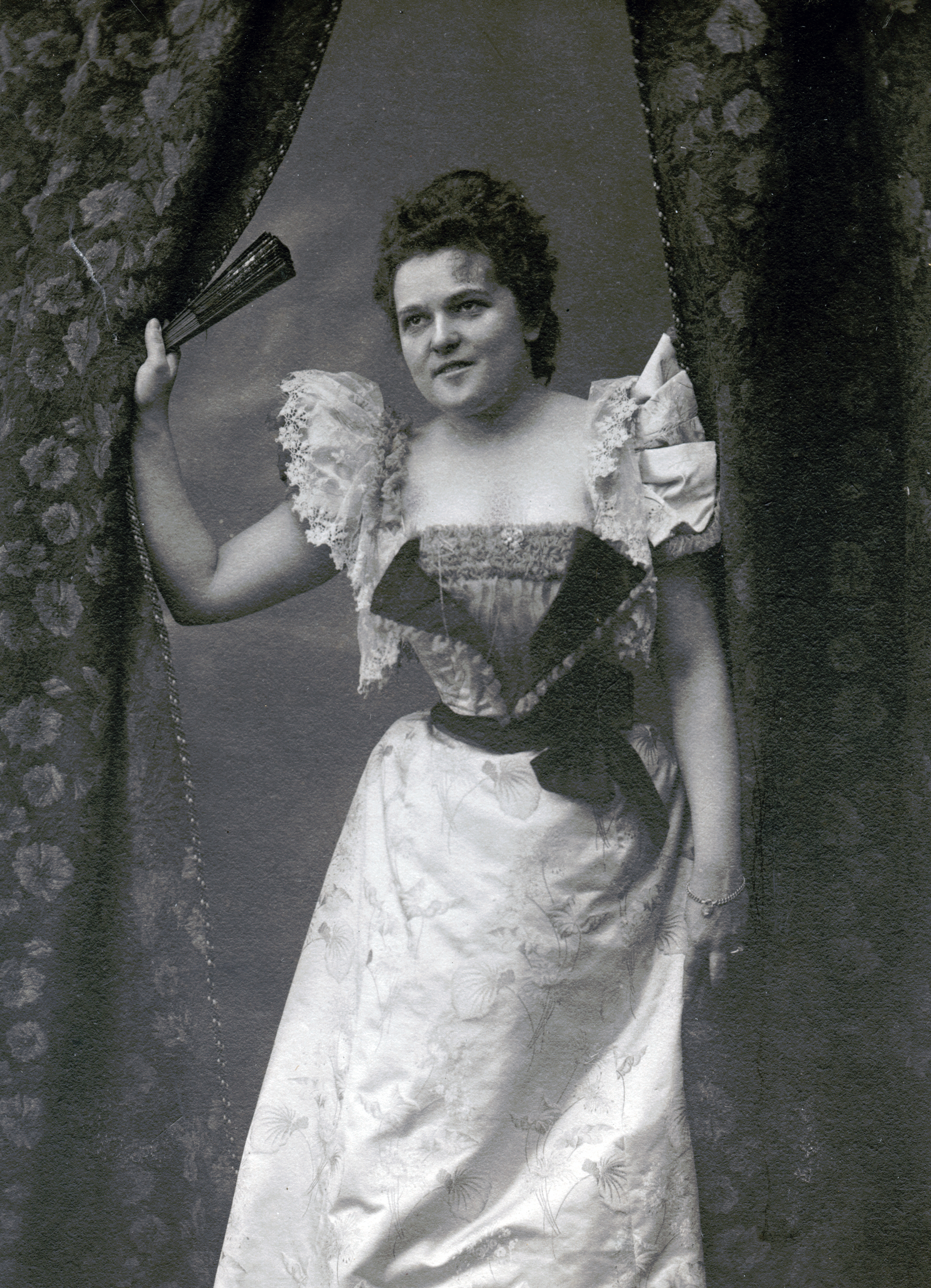 Karin Swanström, skådespelare 1897